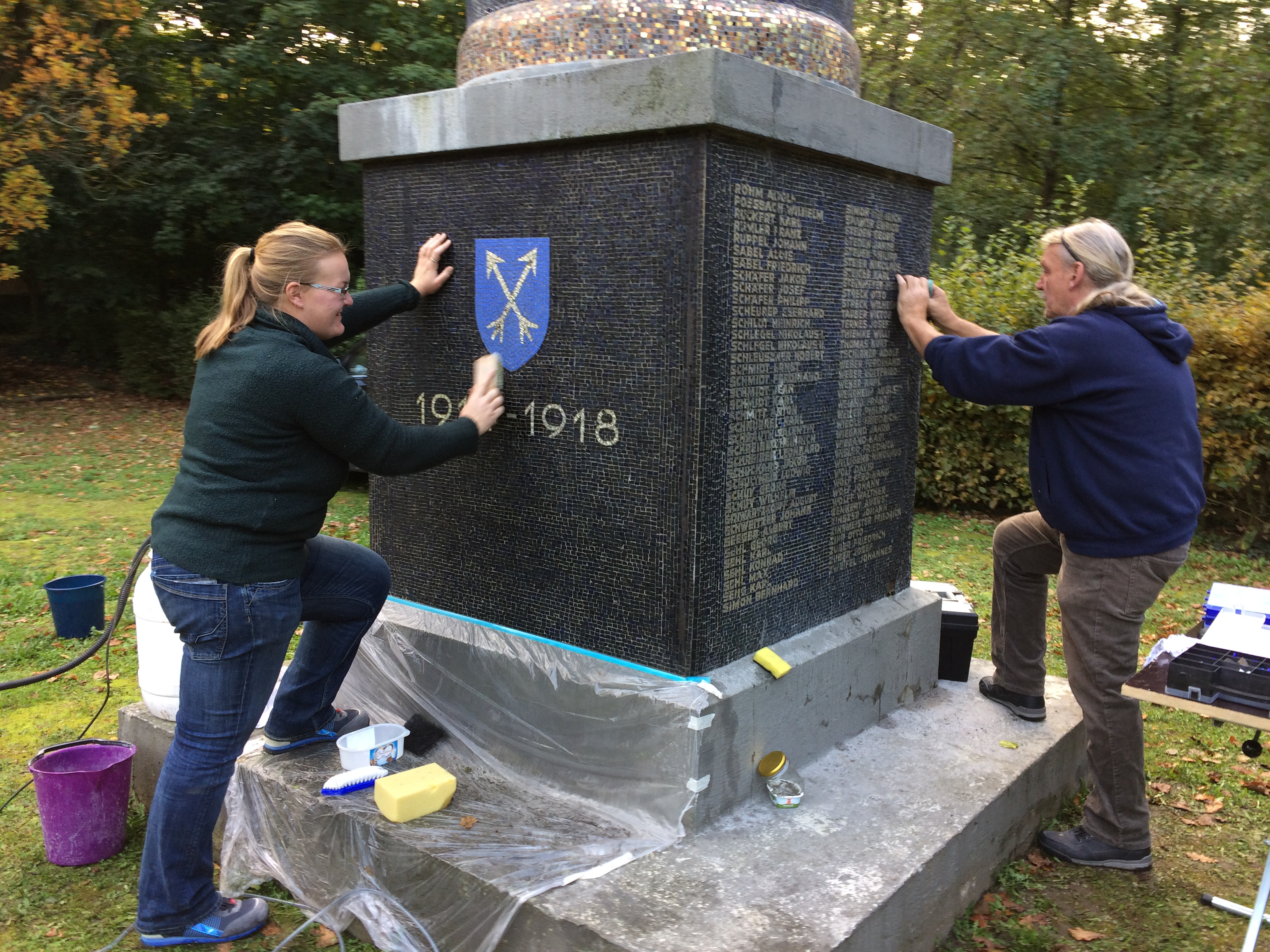 Ehrenmal Oberursel Restaurierung des Sockels durch Klaus-Peter und Anna Dyroff von Mosaik-Kunst Klaus-Peter Dyroff aus Schmiedeberg (Dippoldiswalde) in Sachsen. Foto: Christoph Müllerleile